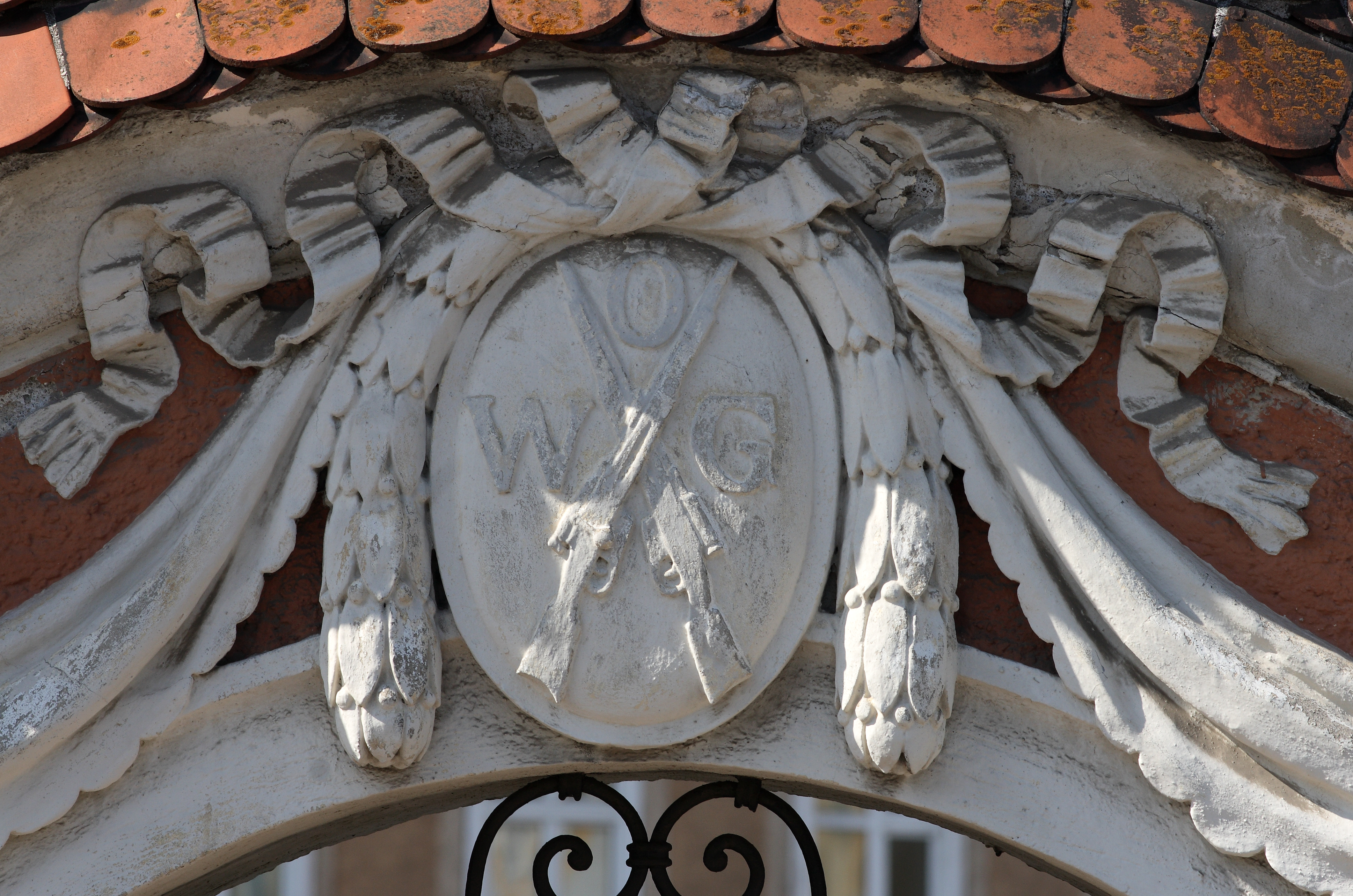 Emblem der Österreichischen Waffenfabriksgesellschaft am Haus Hessenplatz 3 in Steyr